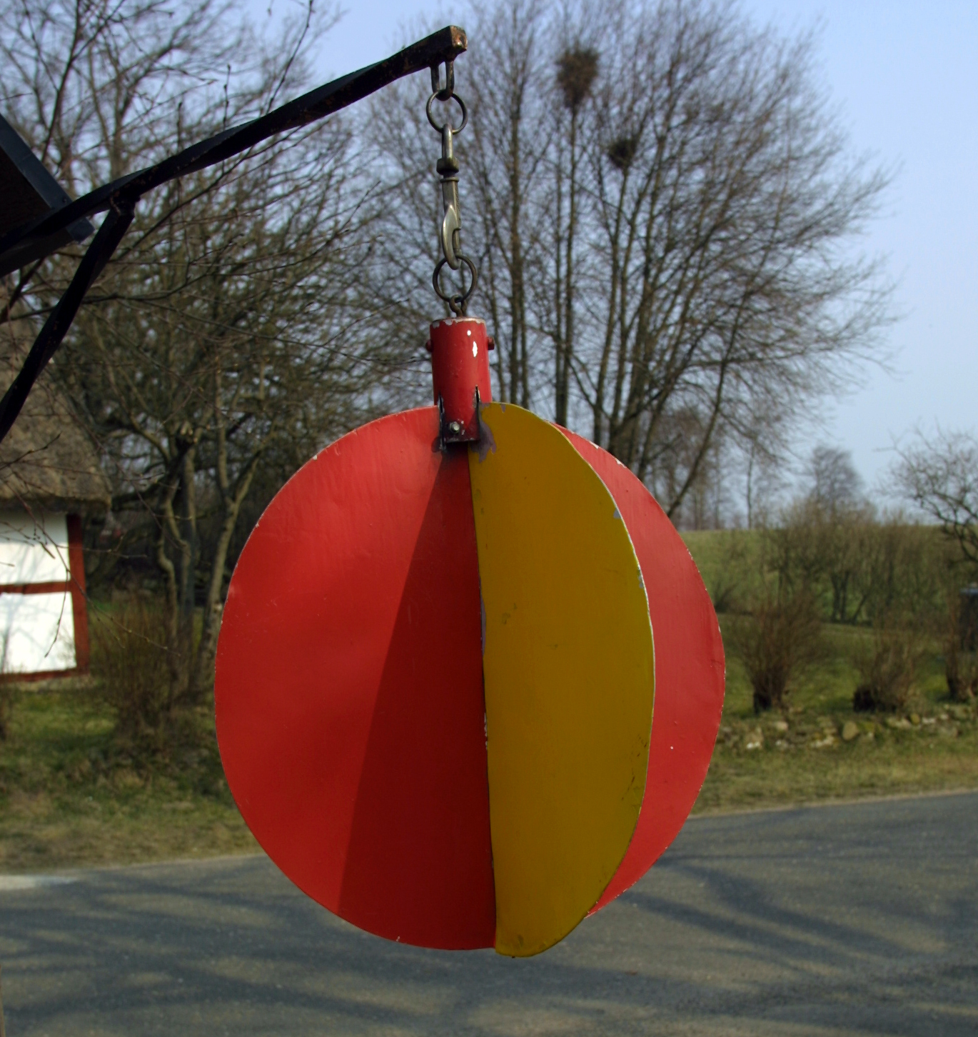 Östra Skånes Konstnärsgilles (ÖSKG) välkända boll under Konstrundan på Österlen.